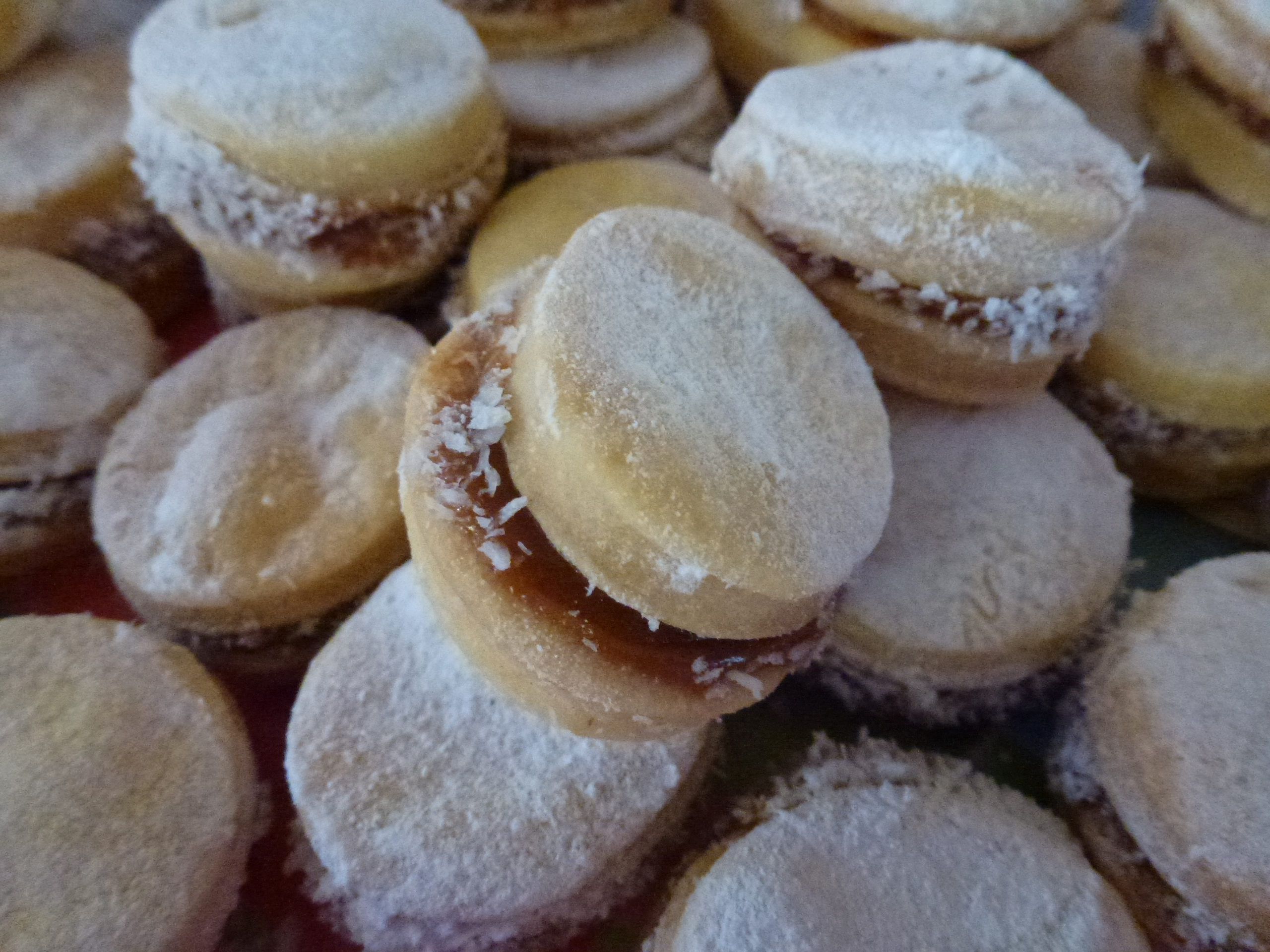 Alfajores